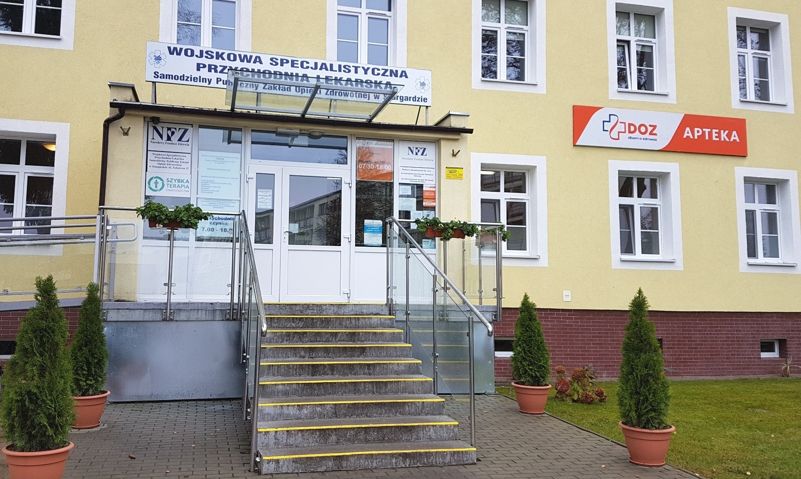 Stargard. WSPL SP ZOZ